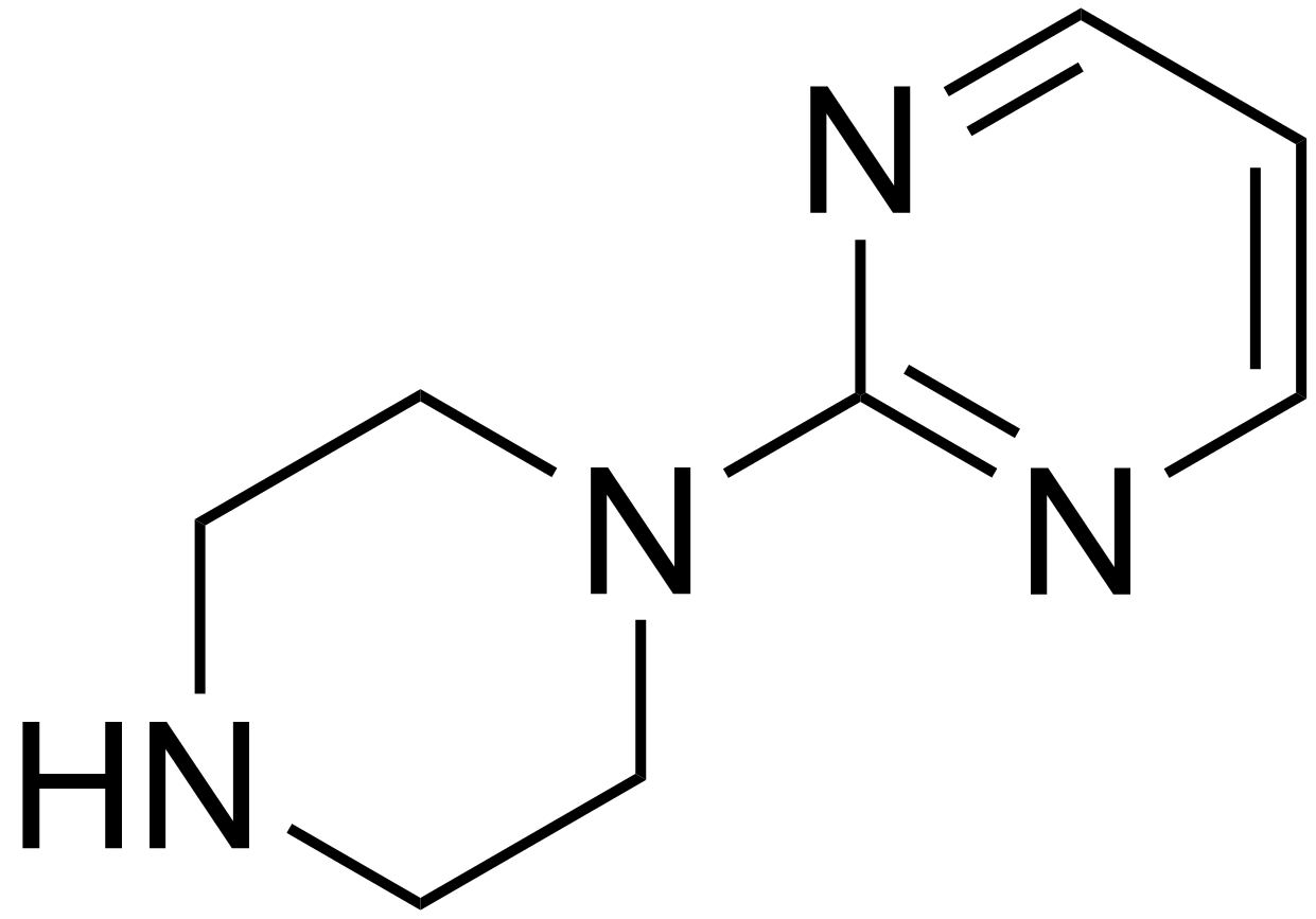 chemical structure of 1-(2-pyrimidinyl)piperazine